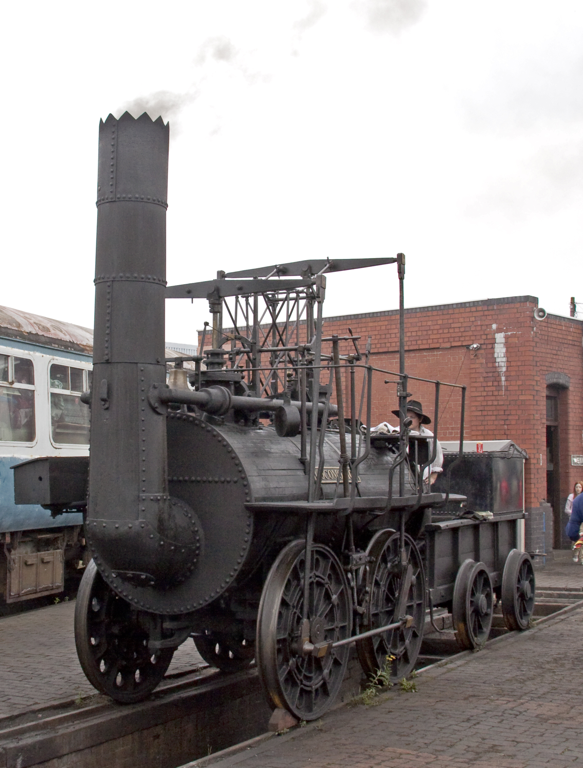 Locomotion 1